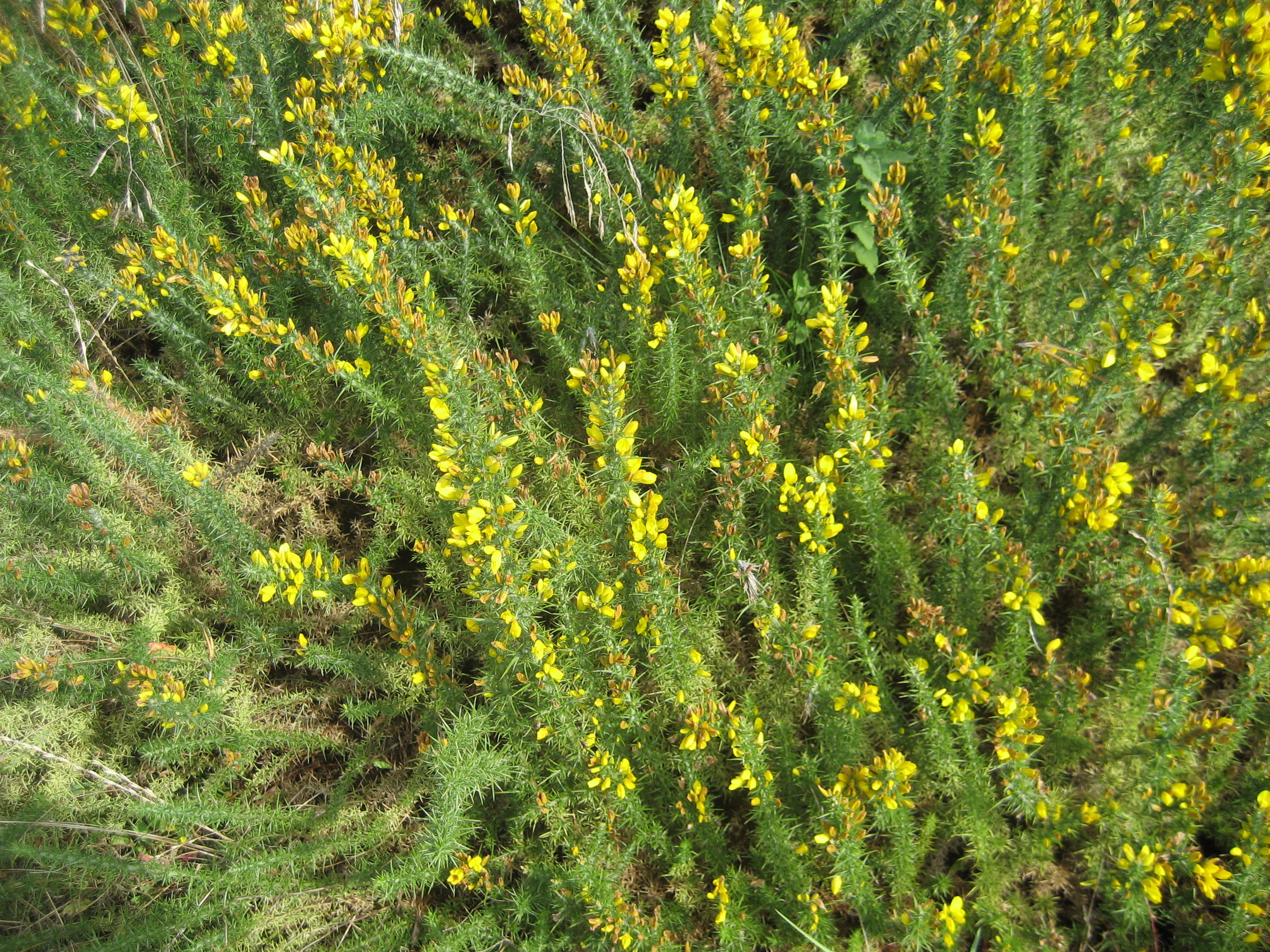 Photographie d'ajoncs nains prise au lieu-dit Lieu dit Condamine à Saint-Victor-sur-Loire (42)